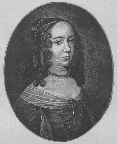 Luise Henriette von Oranien Nach dem Originalgemälde von Gerard von Honthorst (1590-1656), einem holländischen Maler aus dem so genannten Goldenen Zeitalter der Niederlande. Quelle: Hie gut Brandenburg alleweg!, Richard George (Hrsg.), Verlag von W. Pauli's Nachf., Berlin 1900, Seite 377. Art, Urheberschaft und Zeitpunkt der Reproduktion werden nicht angegeben. --Lienhard Schulz 23:24, 19. Feb 2005 (CET)